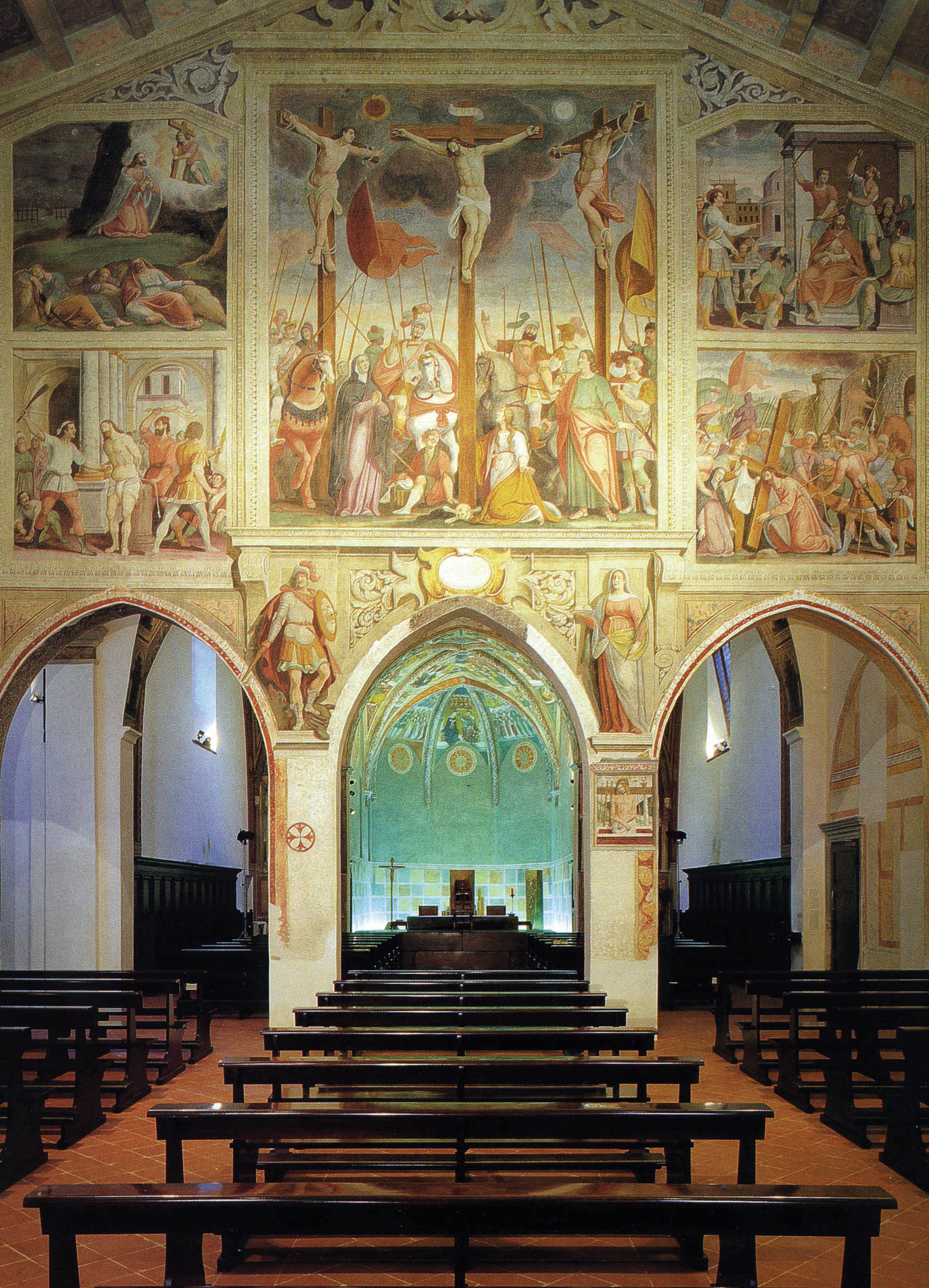 Affreschi di Pietro Baschenis (1590-1630) nell'interno della chiesa dell'Incoronata di Martinengo